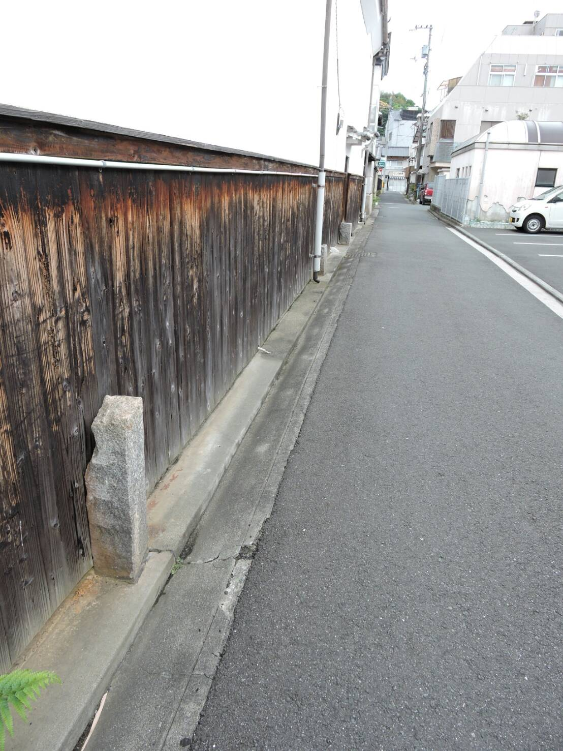 八幡浜が伊予の大阪と呼ばれていた頃、この辺りは出船入船で賑わう海岸線だった。現在は埋め立てられて市街地になったが、多くの交易船を繋いだ石が残っています